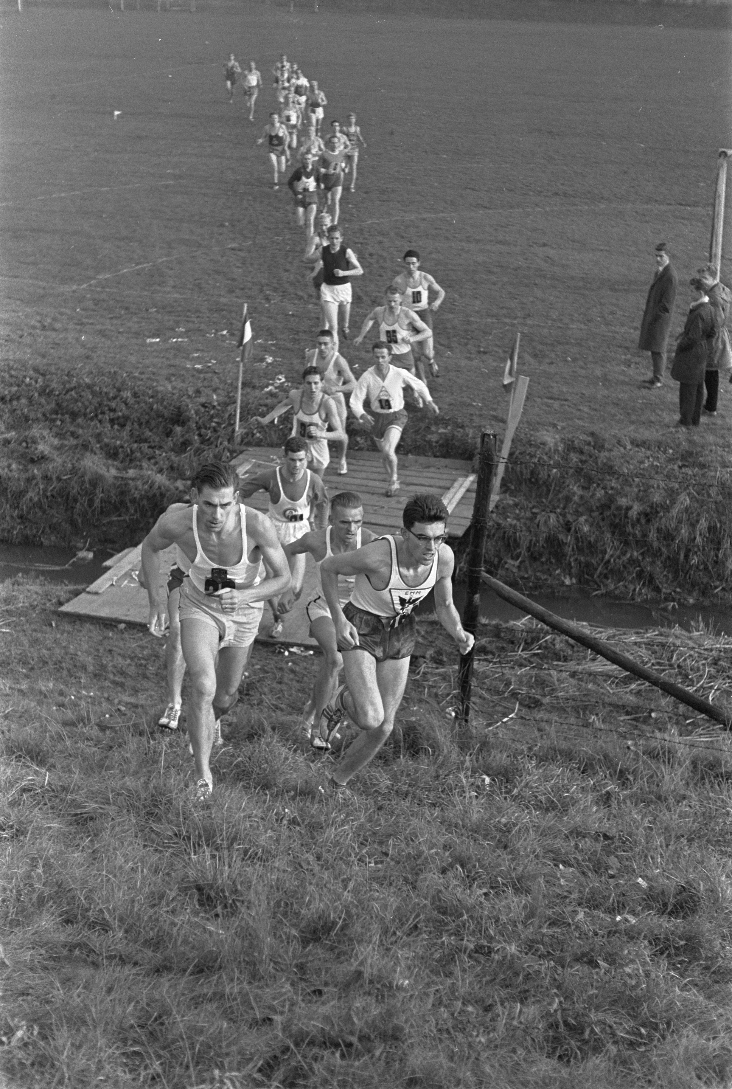 Collectie / Archief : Fotocollectie Anefo Reportage / Serie : [ onbekend ] Beschrijving : Nederlandse veldloopkampioenschap in Dordrecht. Frans Kunen Datum : 8 november 1959 Locatie : Dordrecht Trefwoorden : veldloopkampioenschappen Fotograaf : Pot, Harry / Anefo Auteursrechthebbende : Nationaal Archief Materiaalsoort : Negatief (zwart/wit) Nummer archiefinventaris : bekijk toegang 2.24.01.05 Bestanddeelnummer : 910-8069